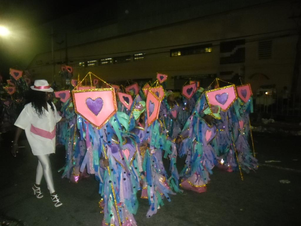 Unidos do Jacarezinho